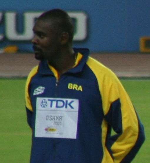 Brazilian ahlete Jadel Gregório